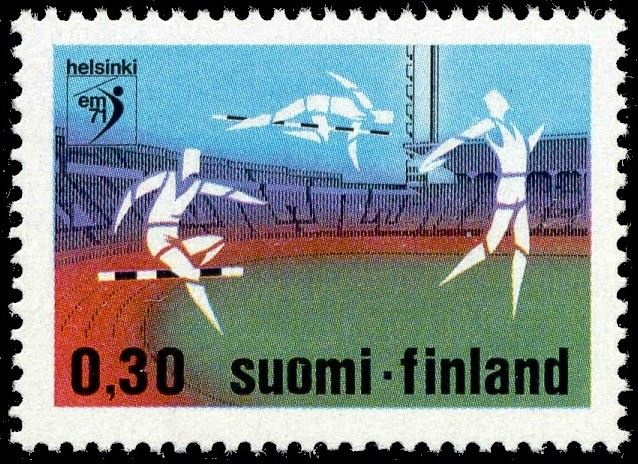 Yleisurheilun EM-kisat 1971 Helsingissä